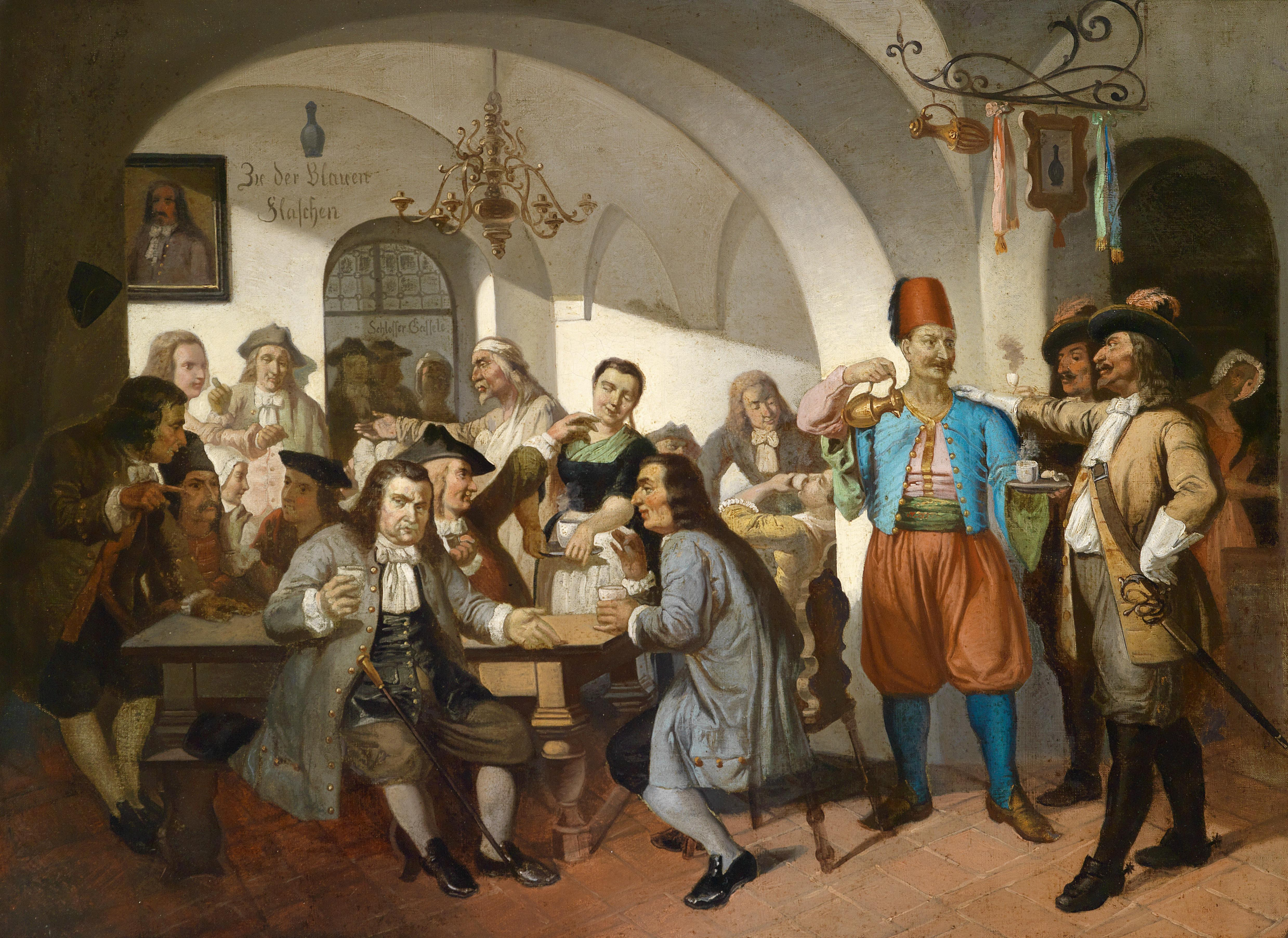 "Zu den blauen Flaschen", Altwiener Kaffeehausszene, Öl auf Leinwand, 63 x 100 cm